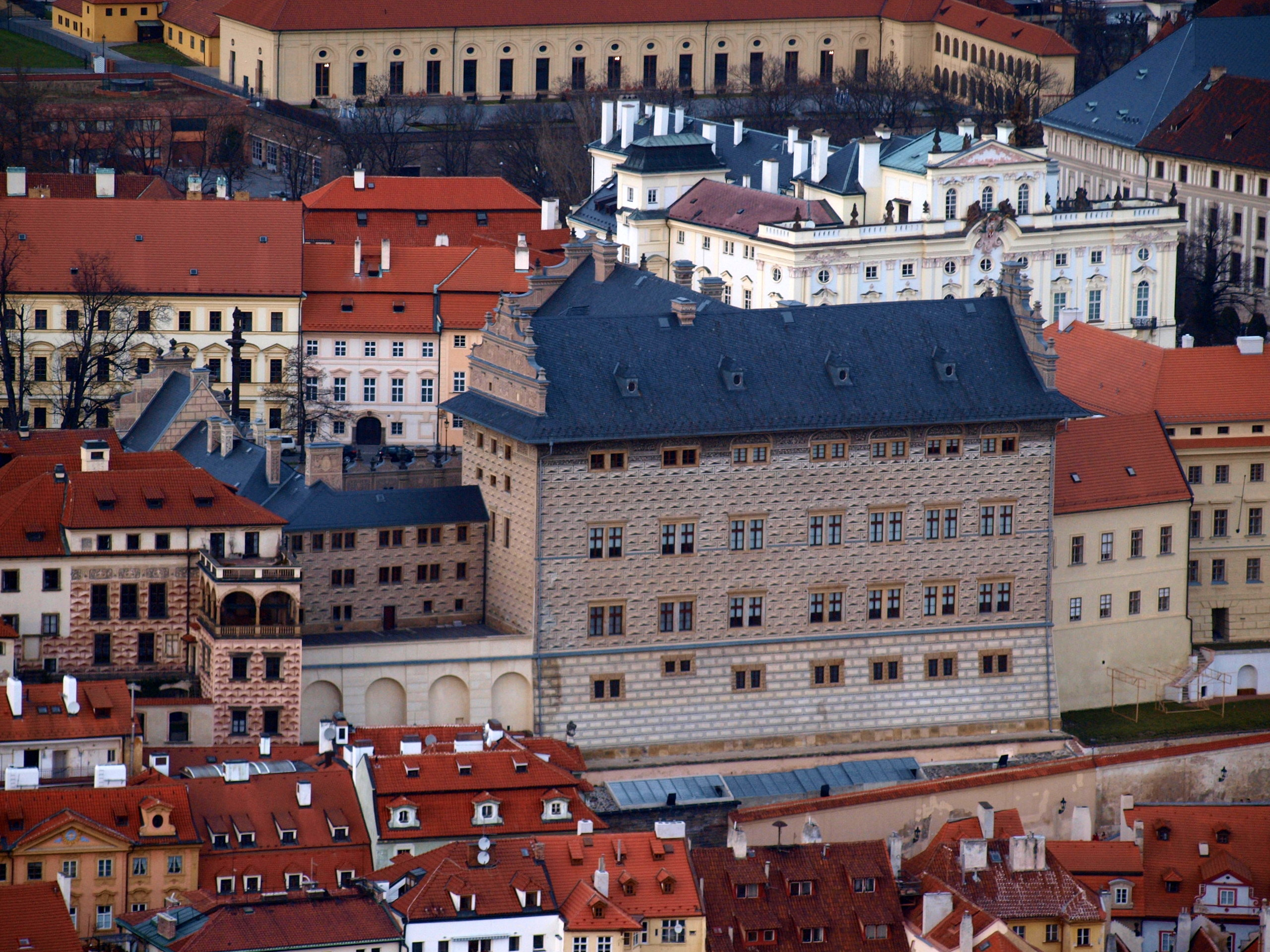 Schwarzenberský palác z Petřína